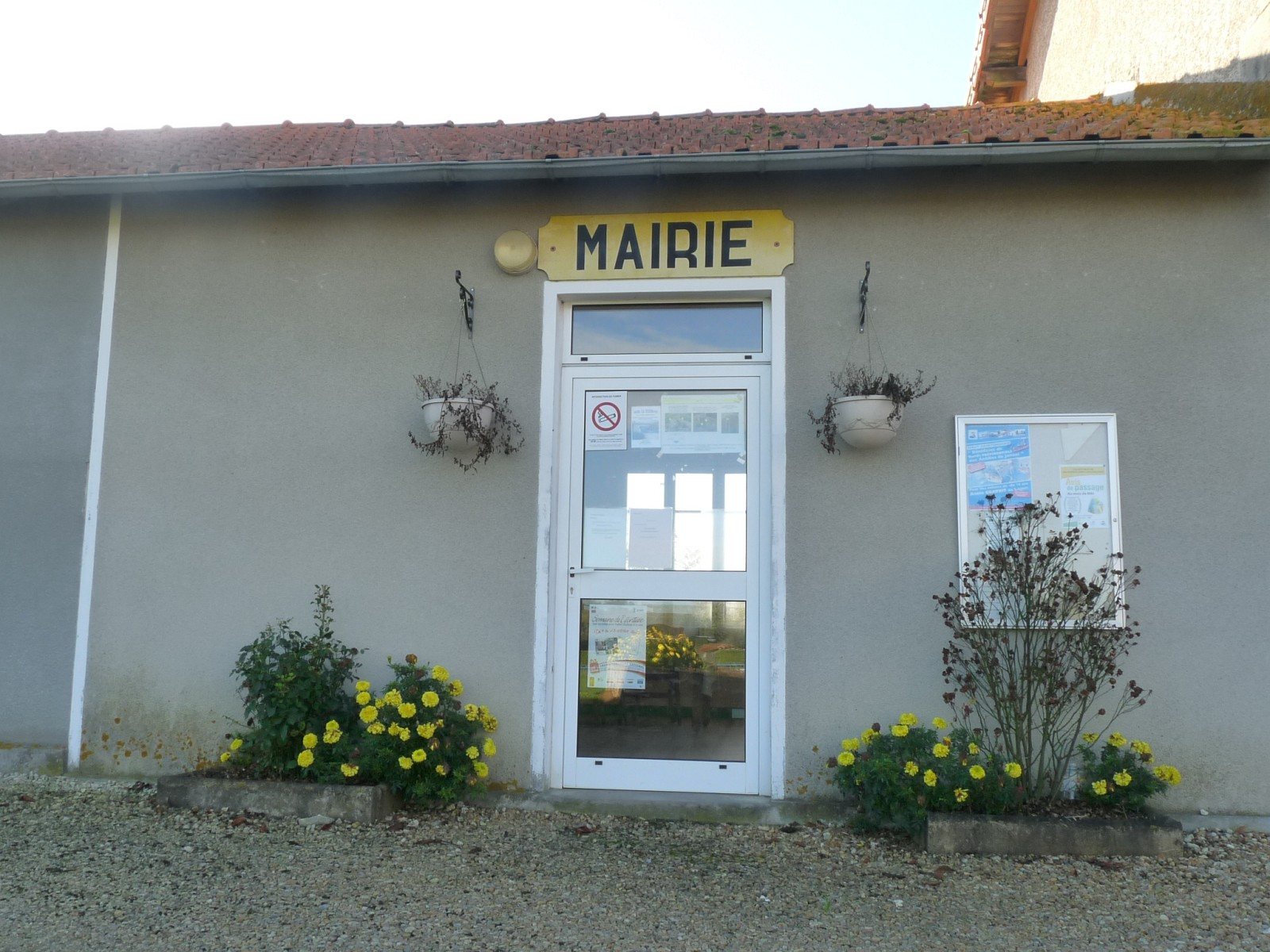 Mairie de Bran, Charente-Maritime, France